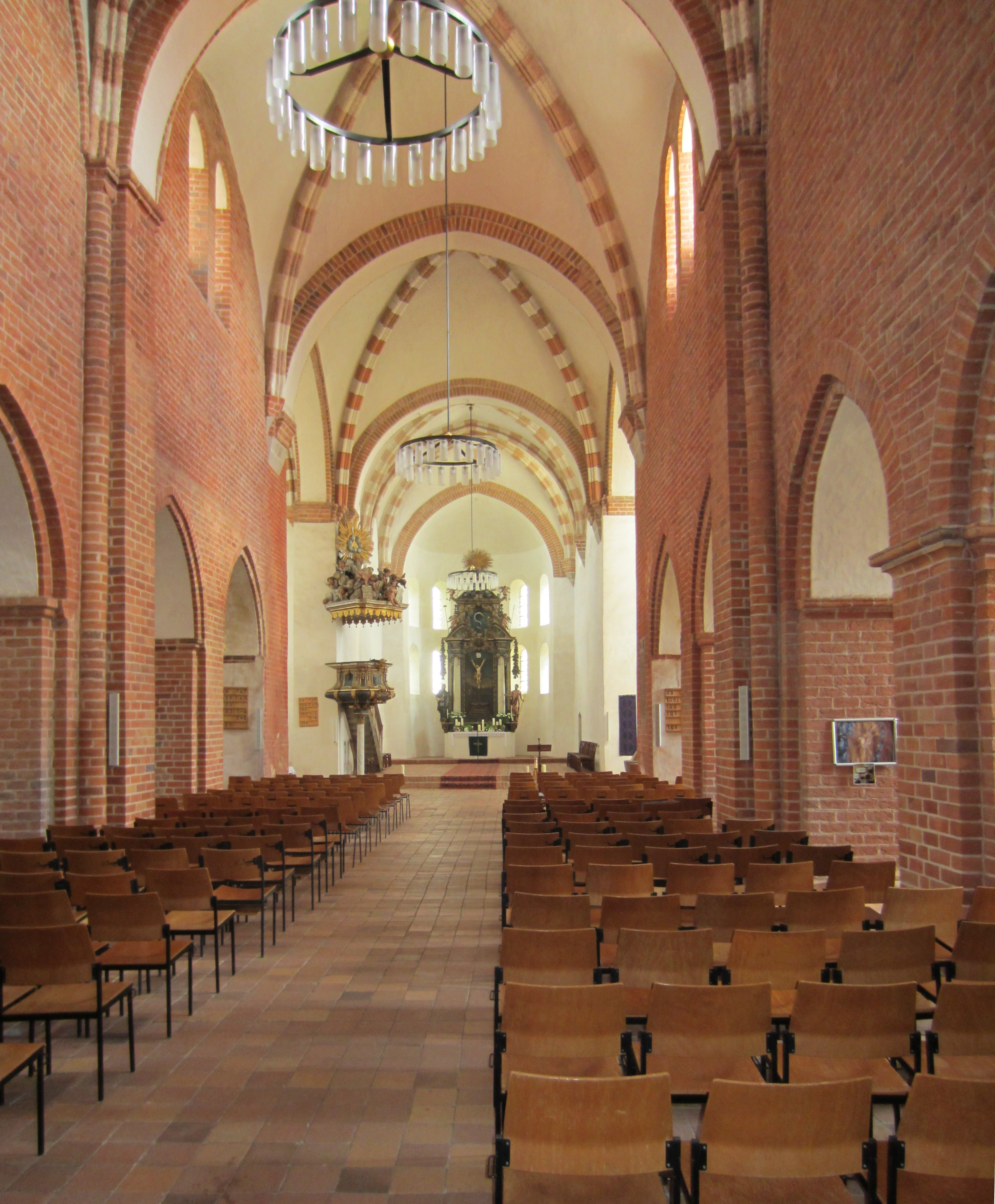 Stadtkirche St. Marien in Treuenbrietzen, Blick durch das Mittelschiff in Richtung Osten